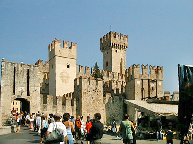 Castello, Sirmione, Lombardia, Italia Description in de wikipedia Beschreibung: Sirmione, Blick auf die Scaligerburg (castello scaligero) Quelle: selbst fotografiert Datum: August 2003